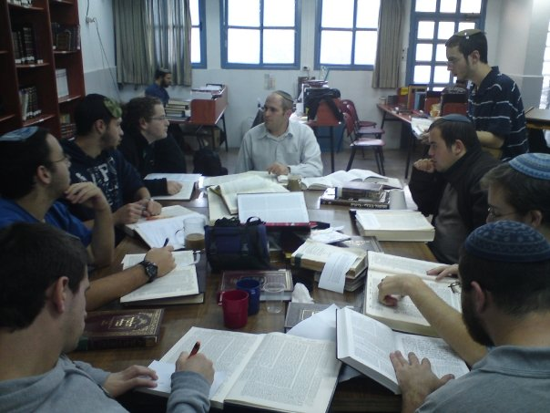 שיעור בישיבת ההסדר בינות רעננה